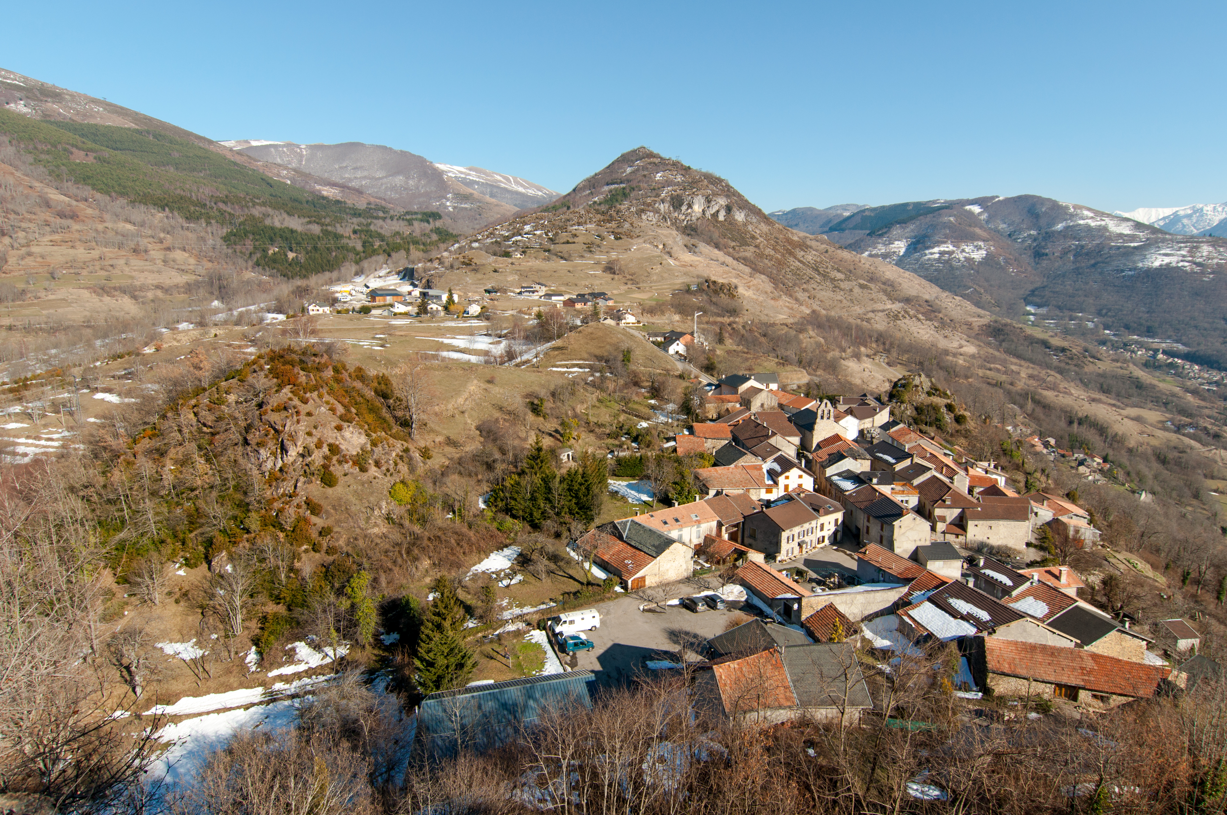 Lordat (09) : le village vu du château